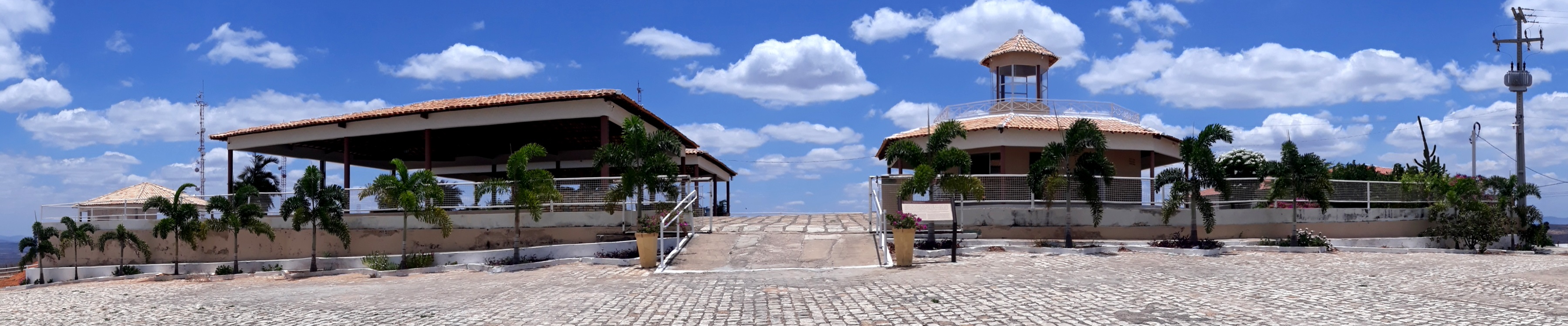 Complexo Turístico Mirante, inaugurado em 2005, em Luís Gomes, no Rio Grande do Norte (Brasil)